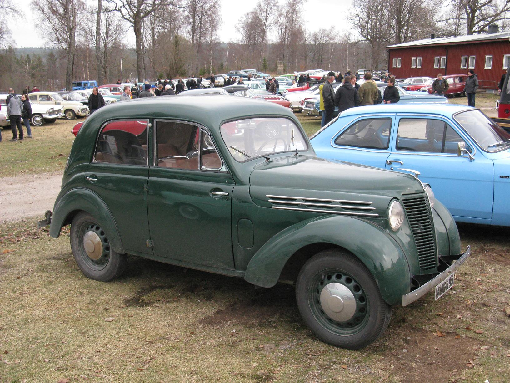 1946 Renault BFK 4 Juvaquatre